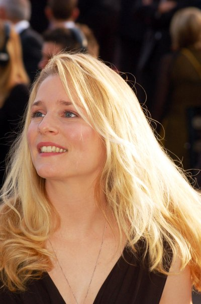 Natacha Régnier au festival de Cannes 2007